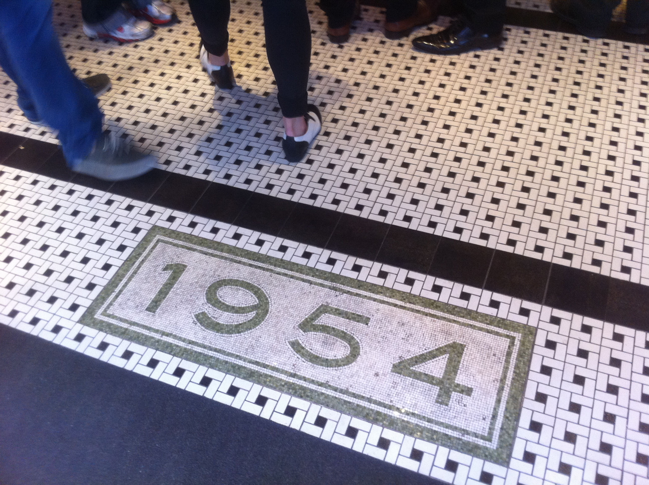 中文（香港）: 中環 擺花街